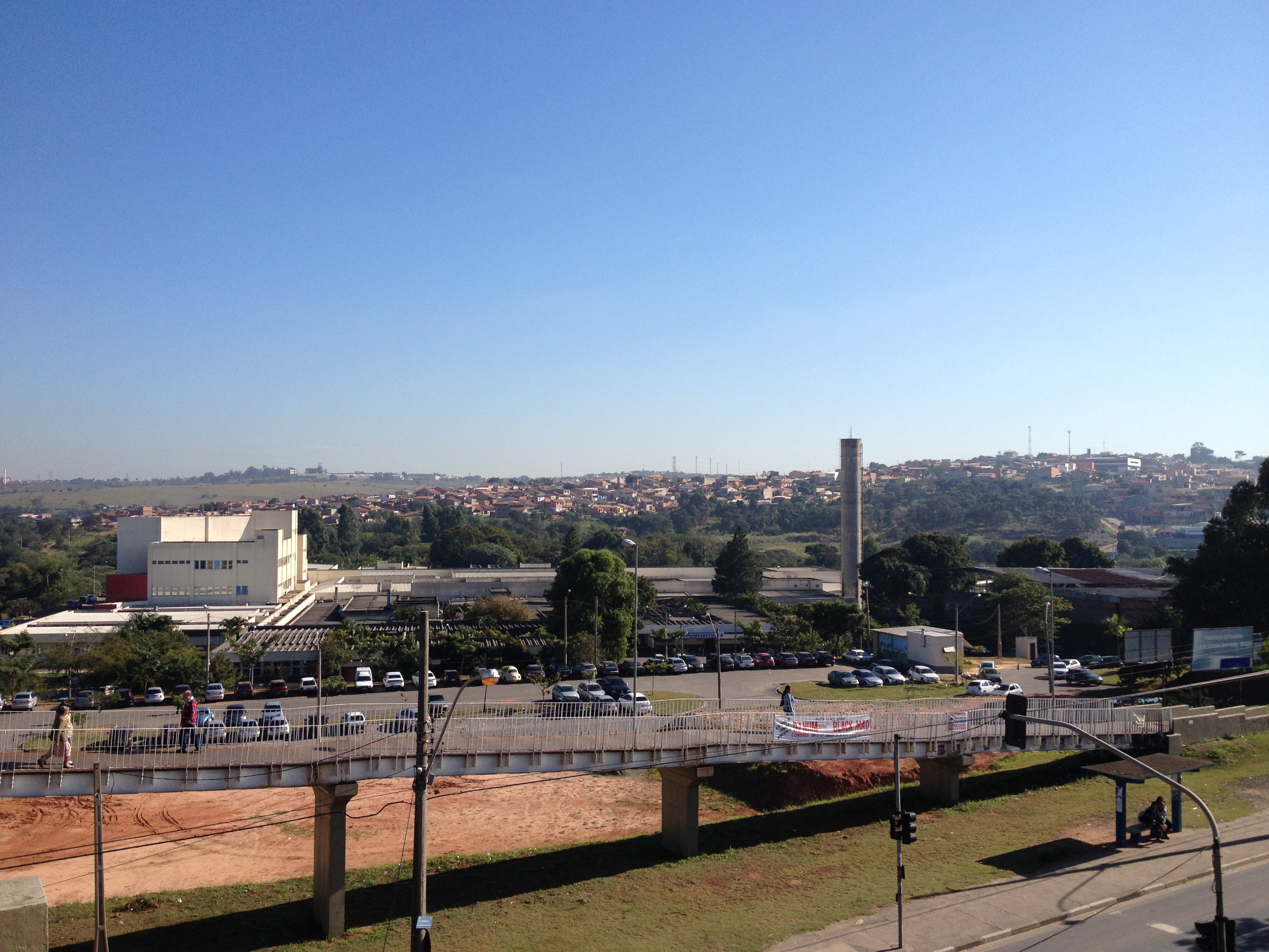 O Hospital Ouro Verde é um dos principais hospitais públicos de Campinas, SP.